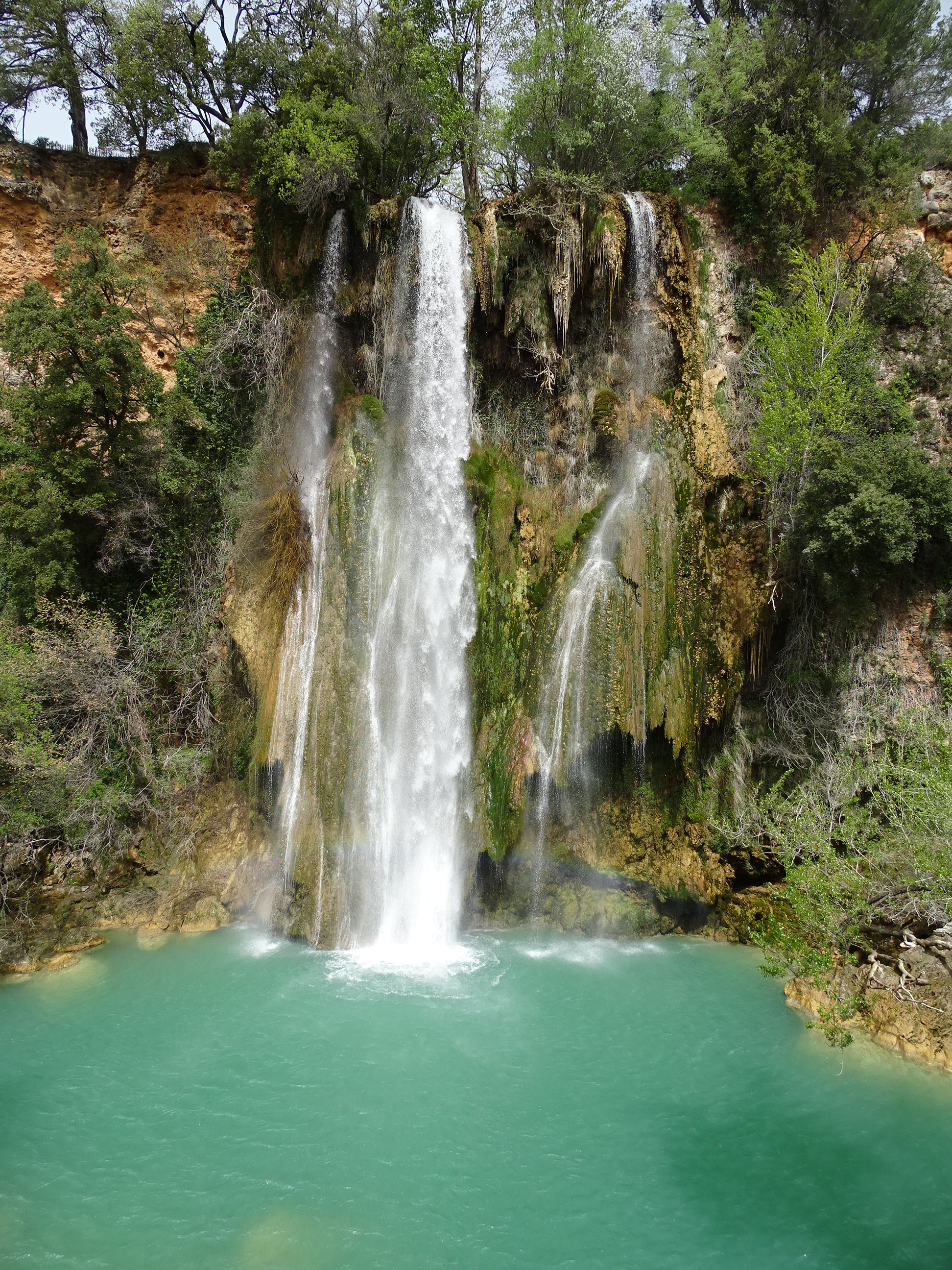 Cascade de Sillans-la-Cascade vue du bas.